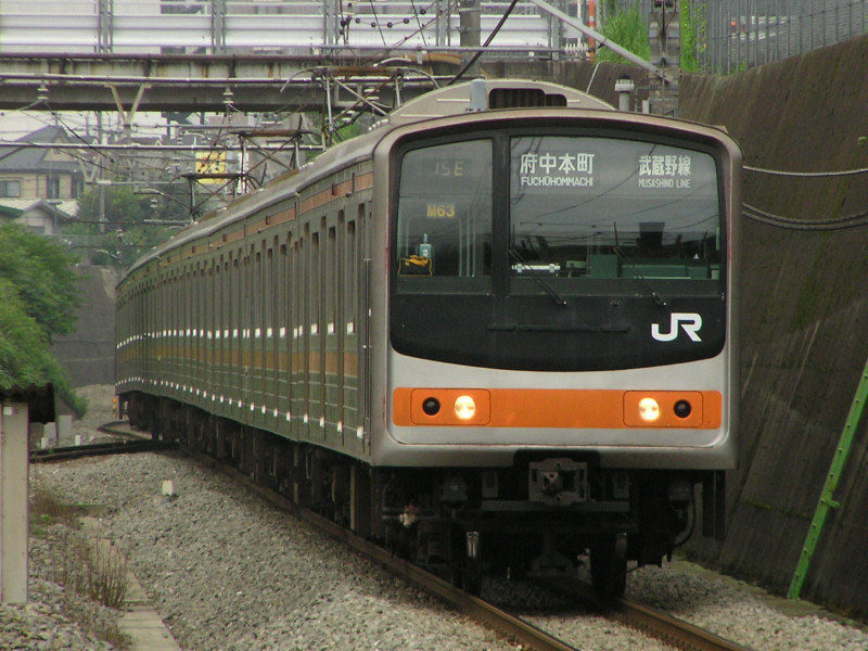 東所沢駅へ到着する武蔵野線205系。